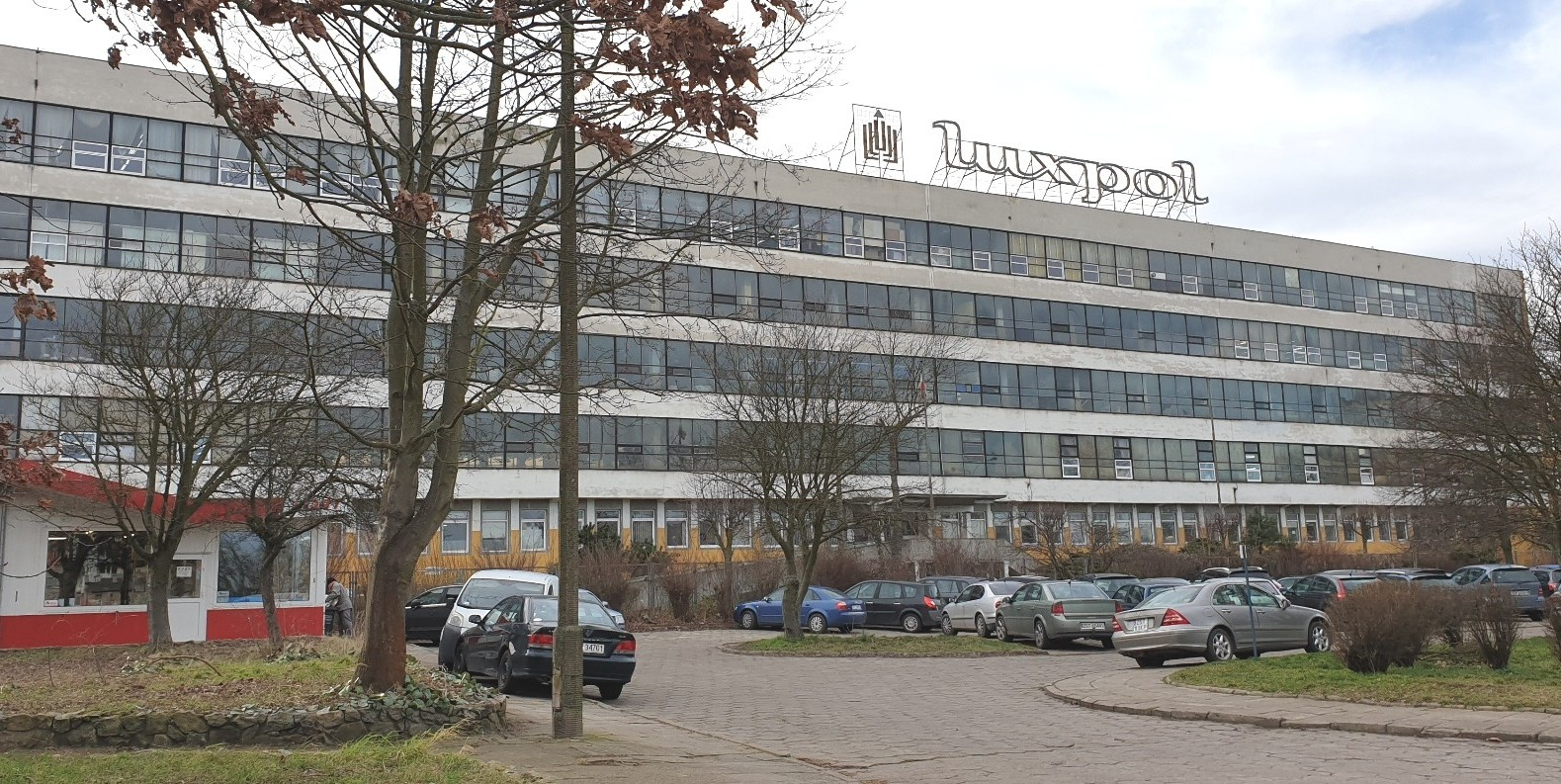 Stargard. Były budynek produkcyjny Luxpolu